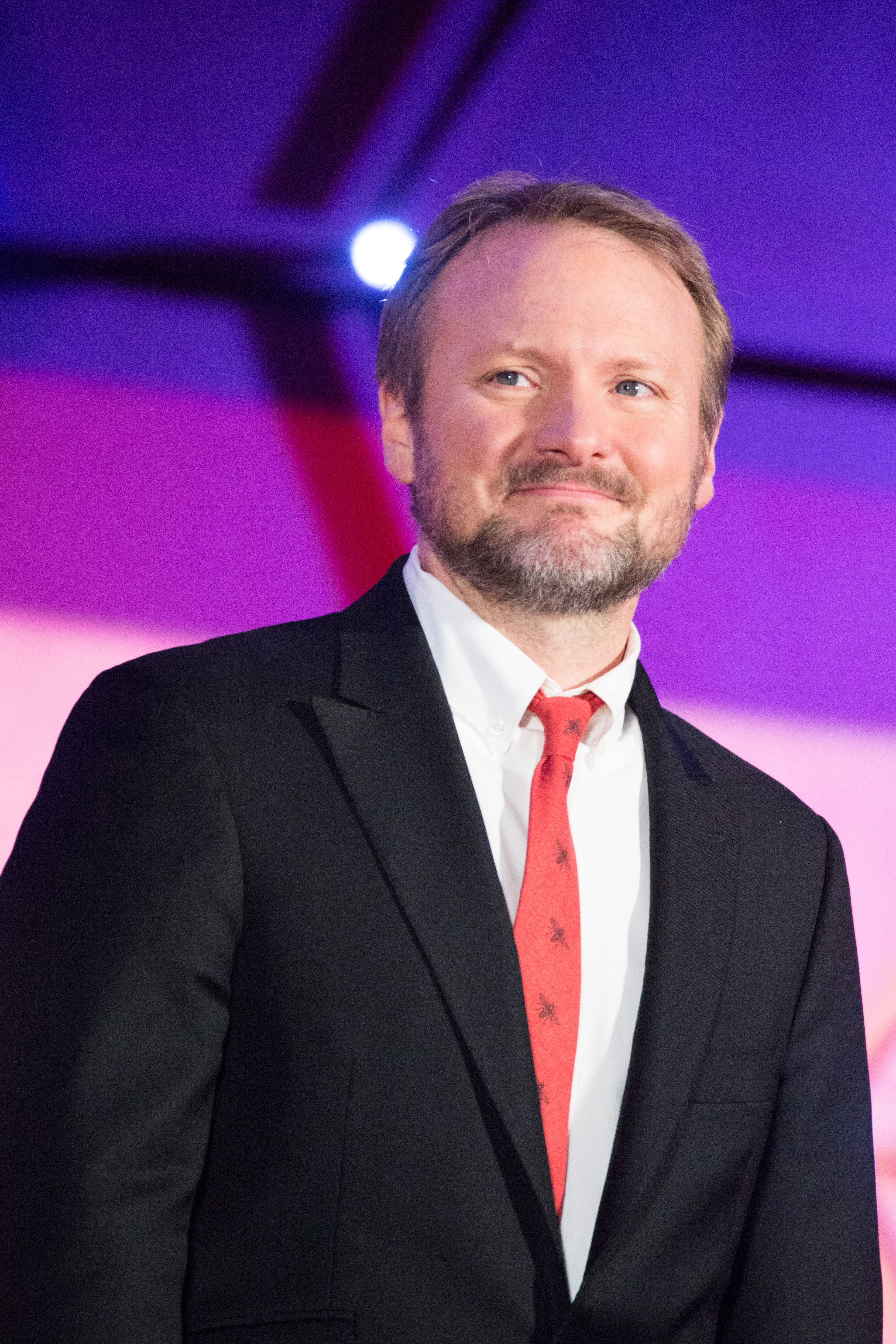 スター・ウォーズ/最後のジェダイ ジャパン・プレミア レッドカーペット ライアン・ジョンソン